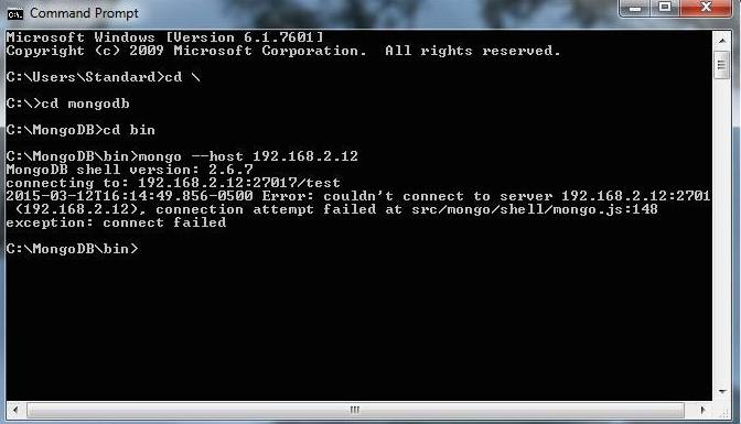 Подключение к MongoDB Shell